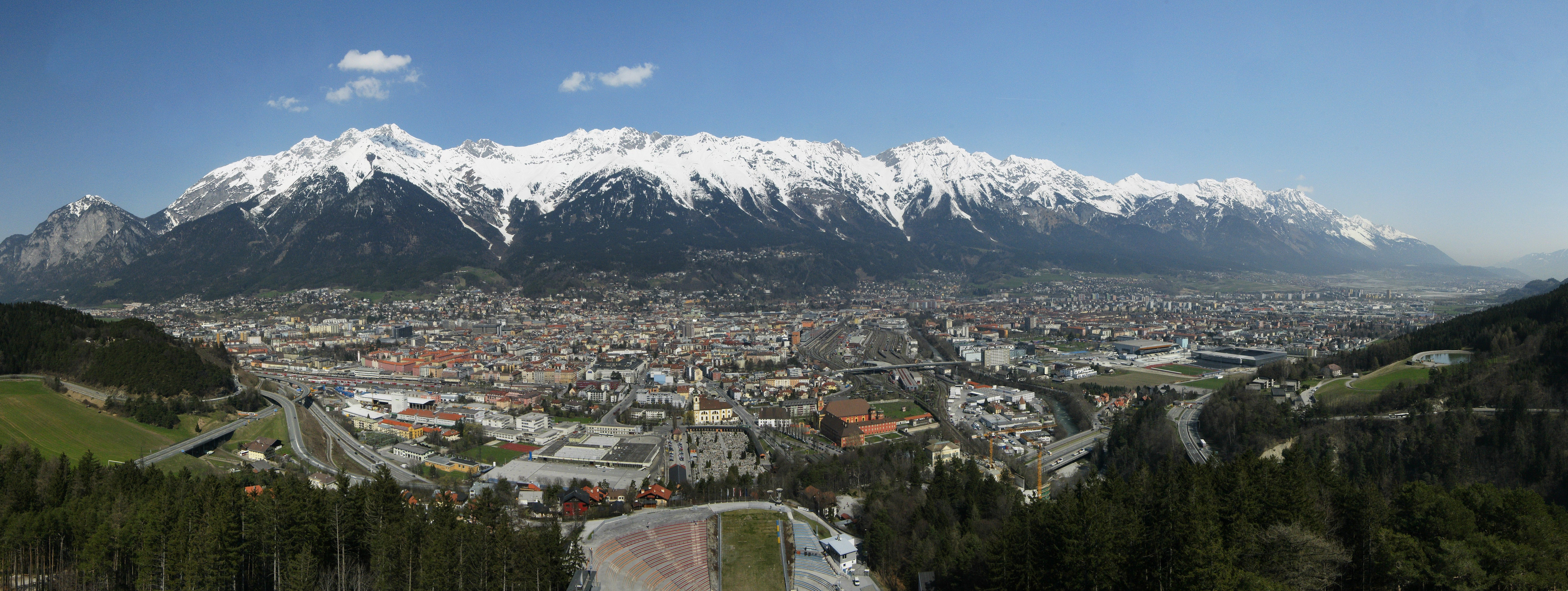 Panorama aus mehreren Bilder von der Bergiselschanze auf Innsbruck mit der noch schneebedeckten Nordkette.